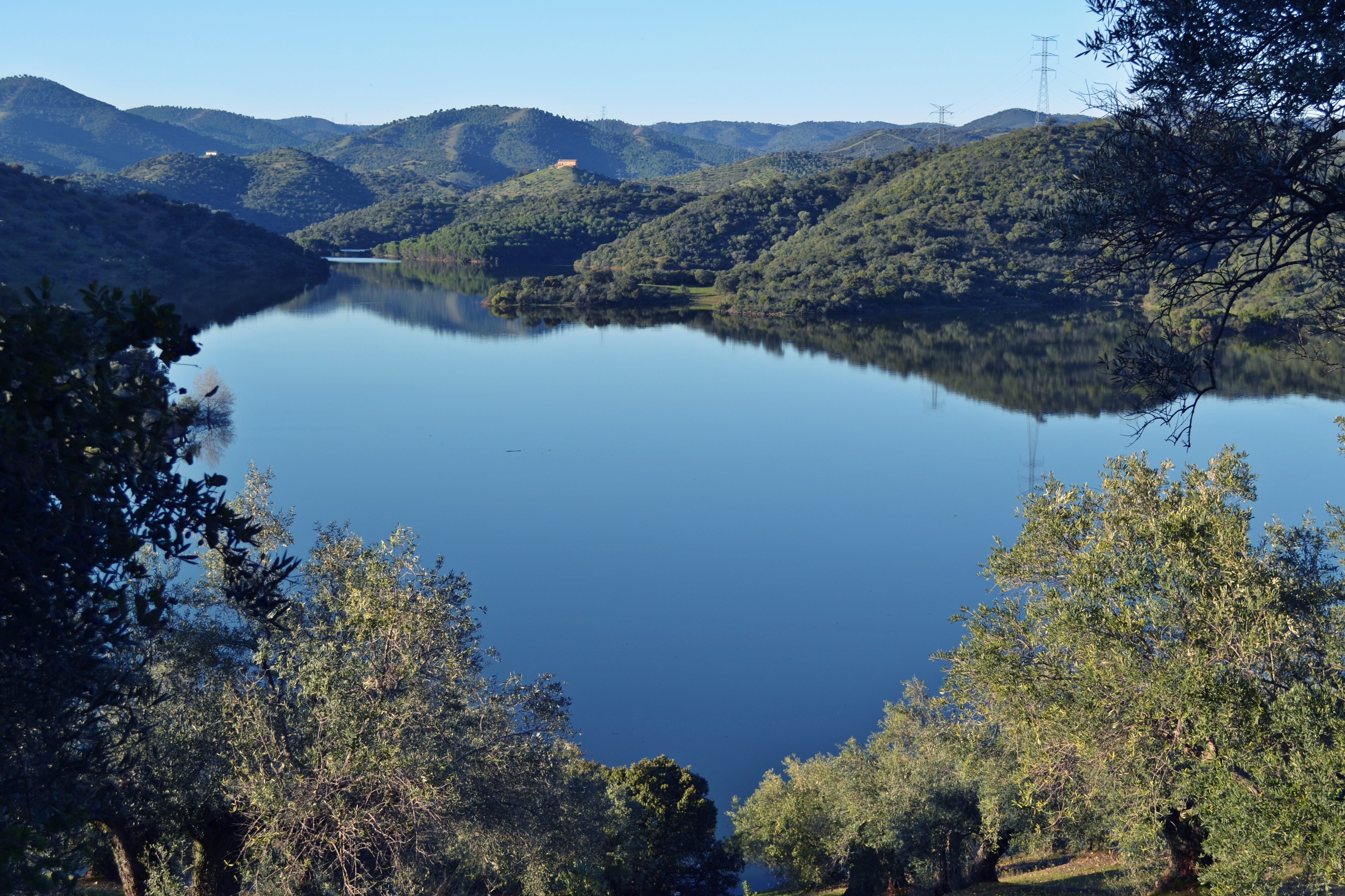 Pantano del Yeguas. Parque natural de la Sierra de Cardeña y Montoro This is a photography of a Special Area of Conservation in Spain with the ID: ES6130001. Natura2000 entry, EEA entry